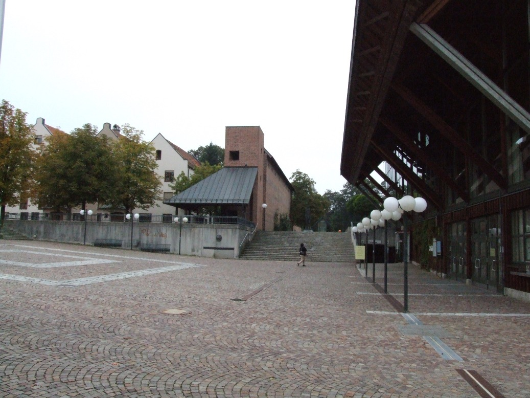 der Stadthallenvorplatz in Memmingen